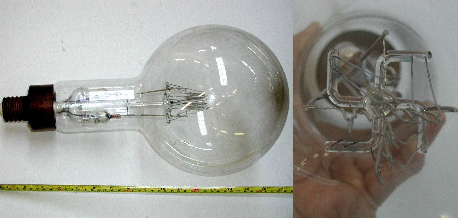 Lámpara original de 3000 W del Faro de Rincón del Bonete